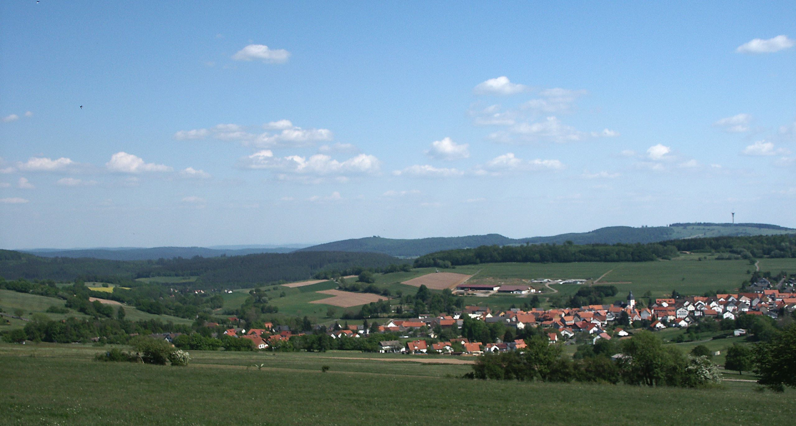 Stadt Schwarzenborn im Knüllgebirge